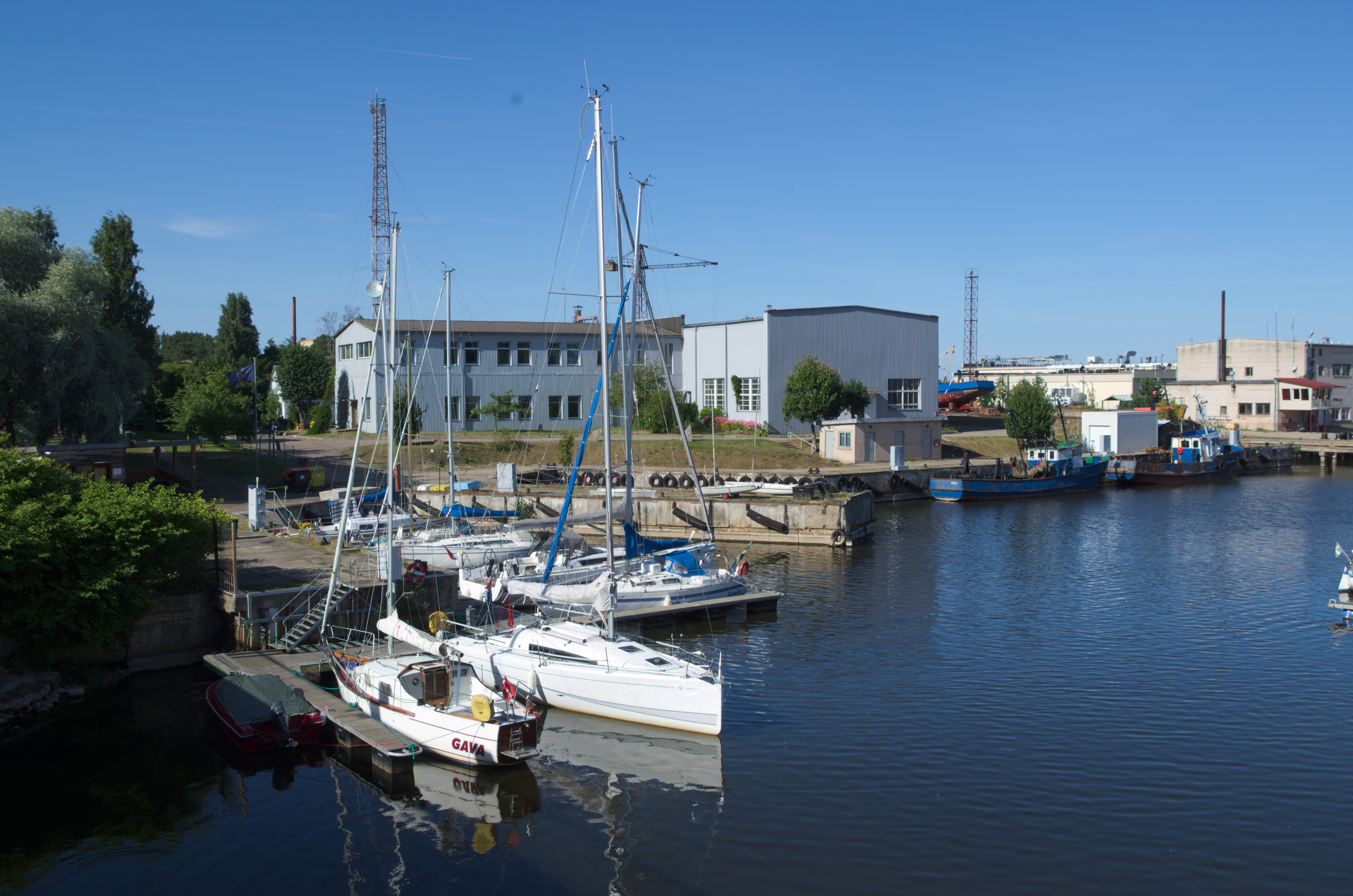 Roja sadam